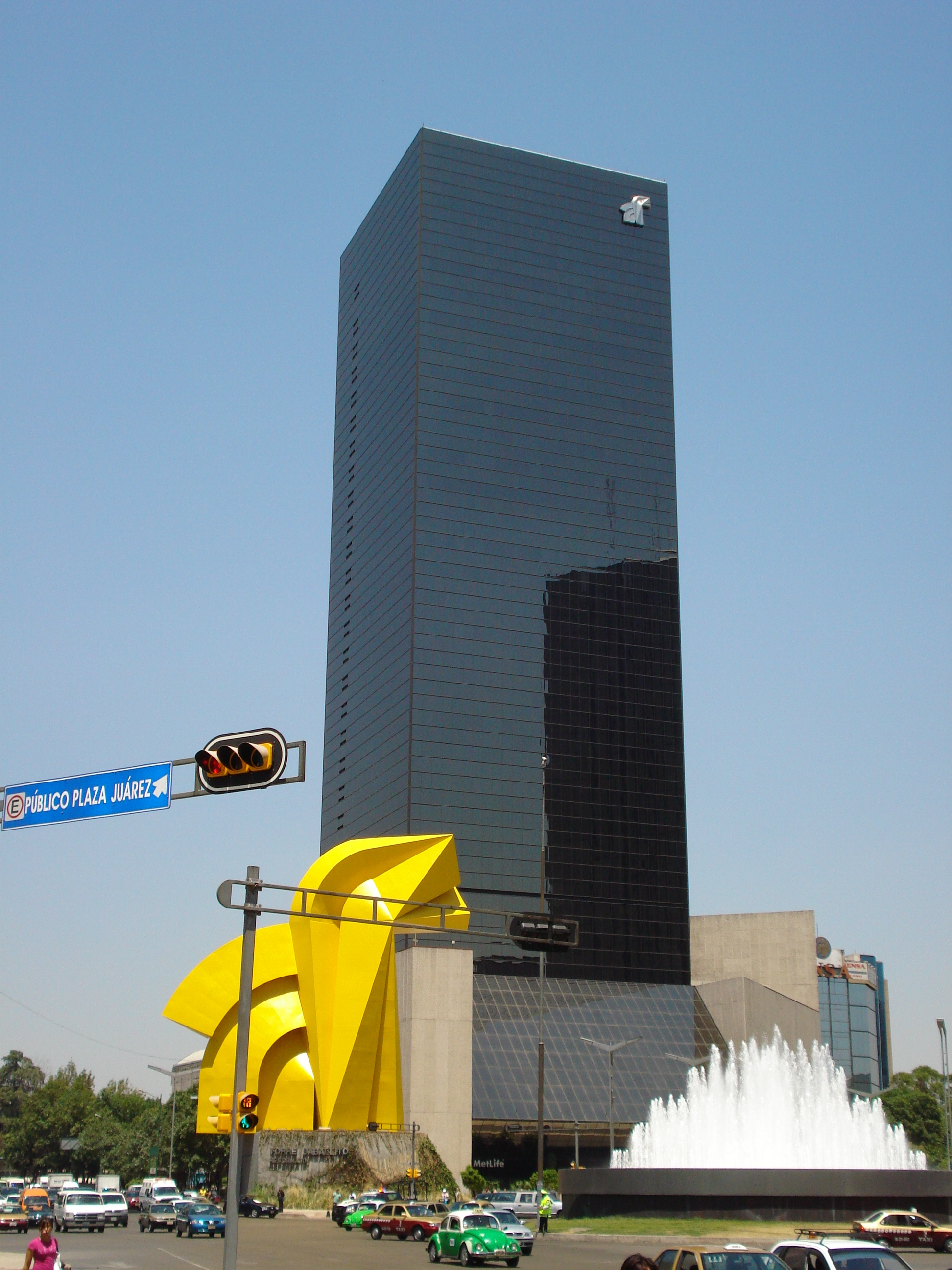 Torre del Caballito en la Ciudad de México.